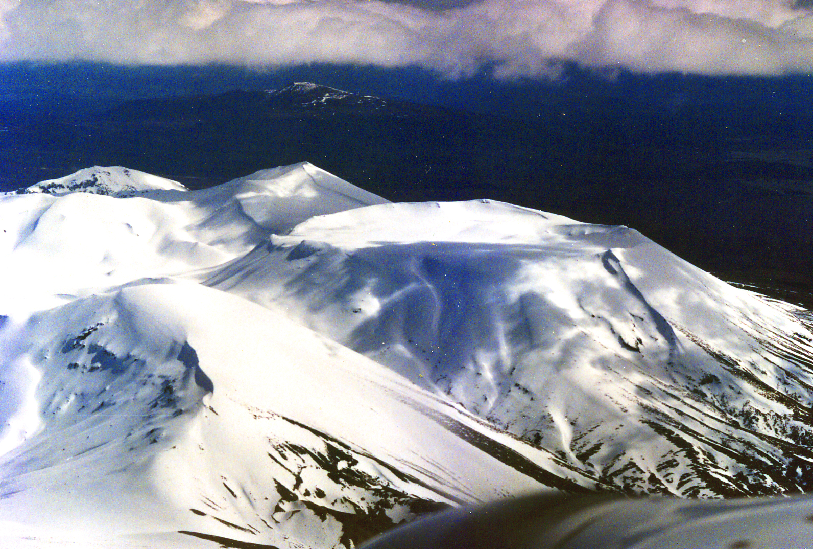 Abeam Mt. Tongariro, en route Rotorua to Paraparaumu in a Piper Aztec.